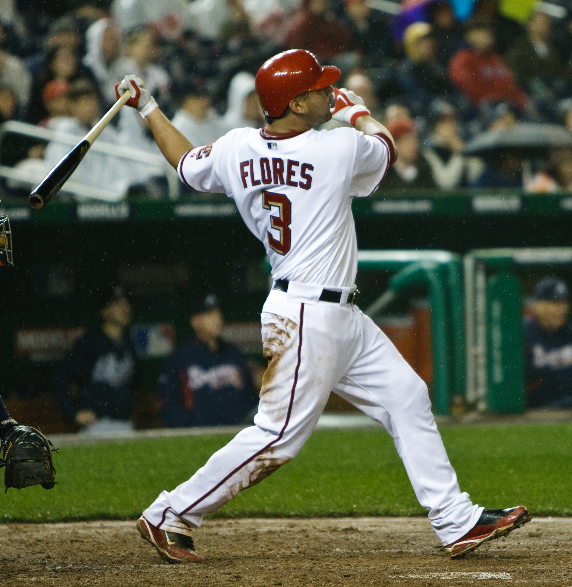 Jesús Flores